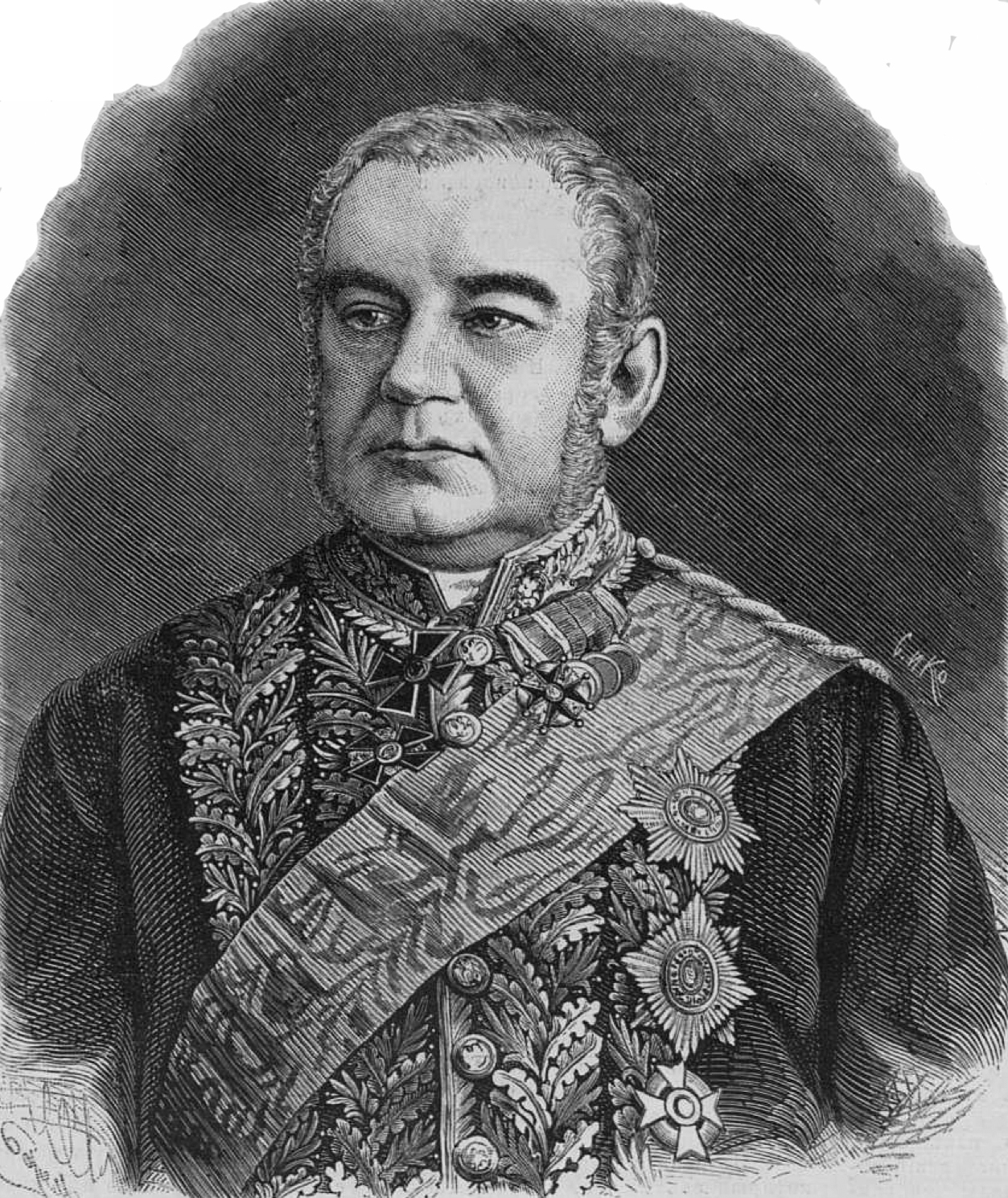 Тройницкий Александр Григорьевич, статистик